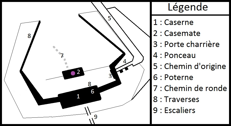 Plan du fort de Beauregard à Besançon (Doubs, France).